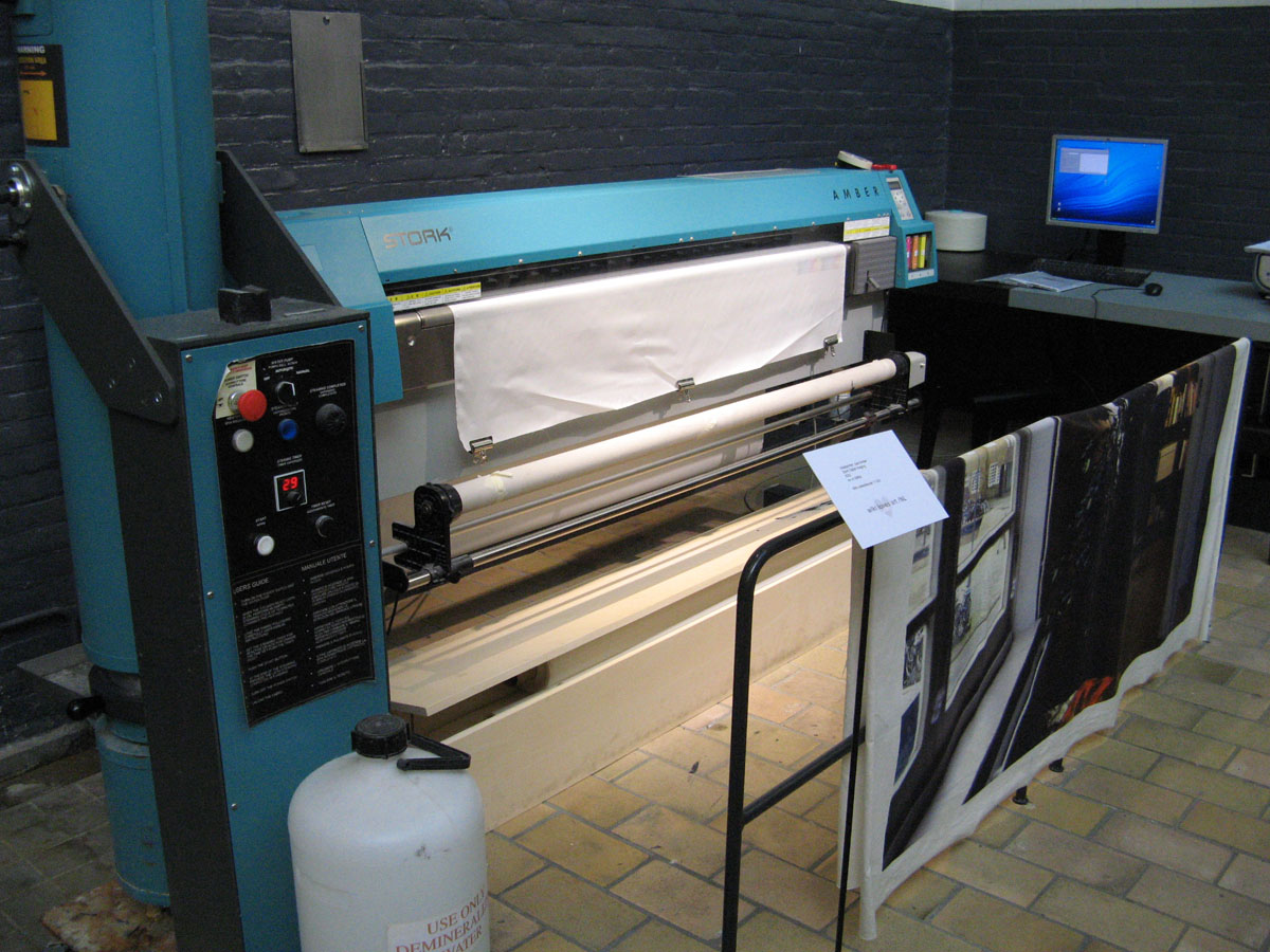 Inkjetprinter, Stork Digital Imaging, 2002, (09992) inkjetprinter